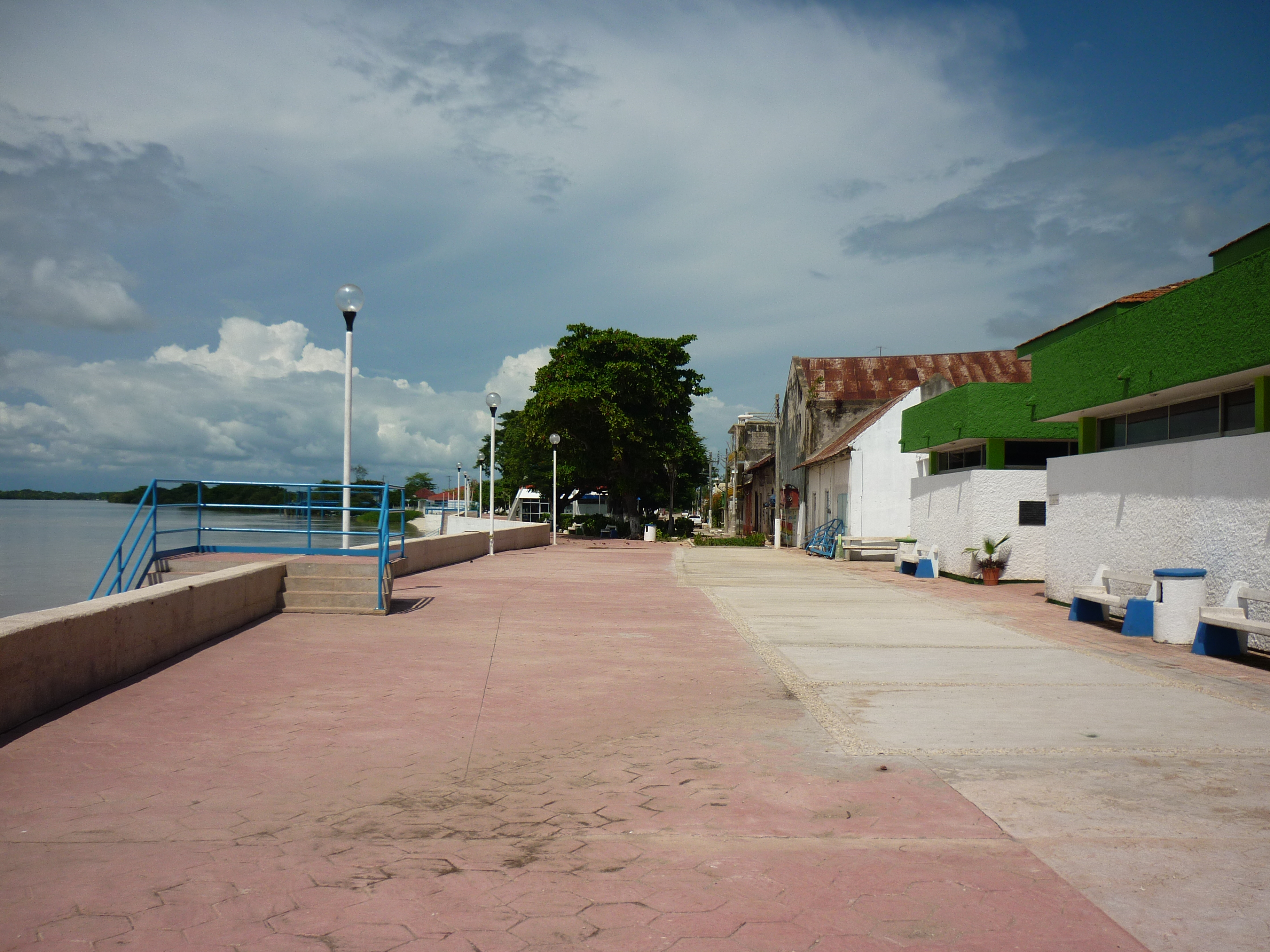 Ciudad De Emiliano Zapata, Tabasco